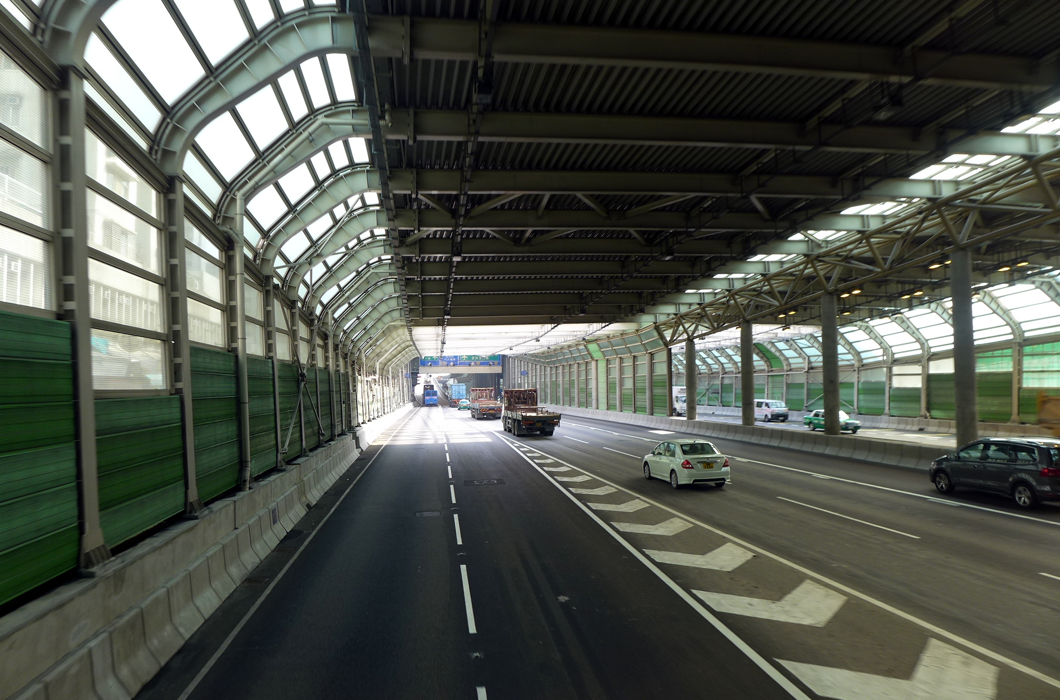 Tuen Mun Road Tuen Mun Section